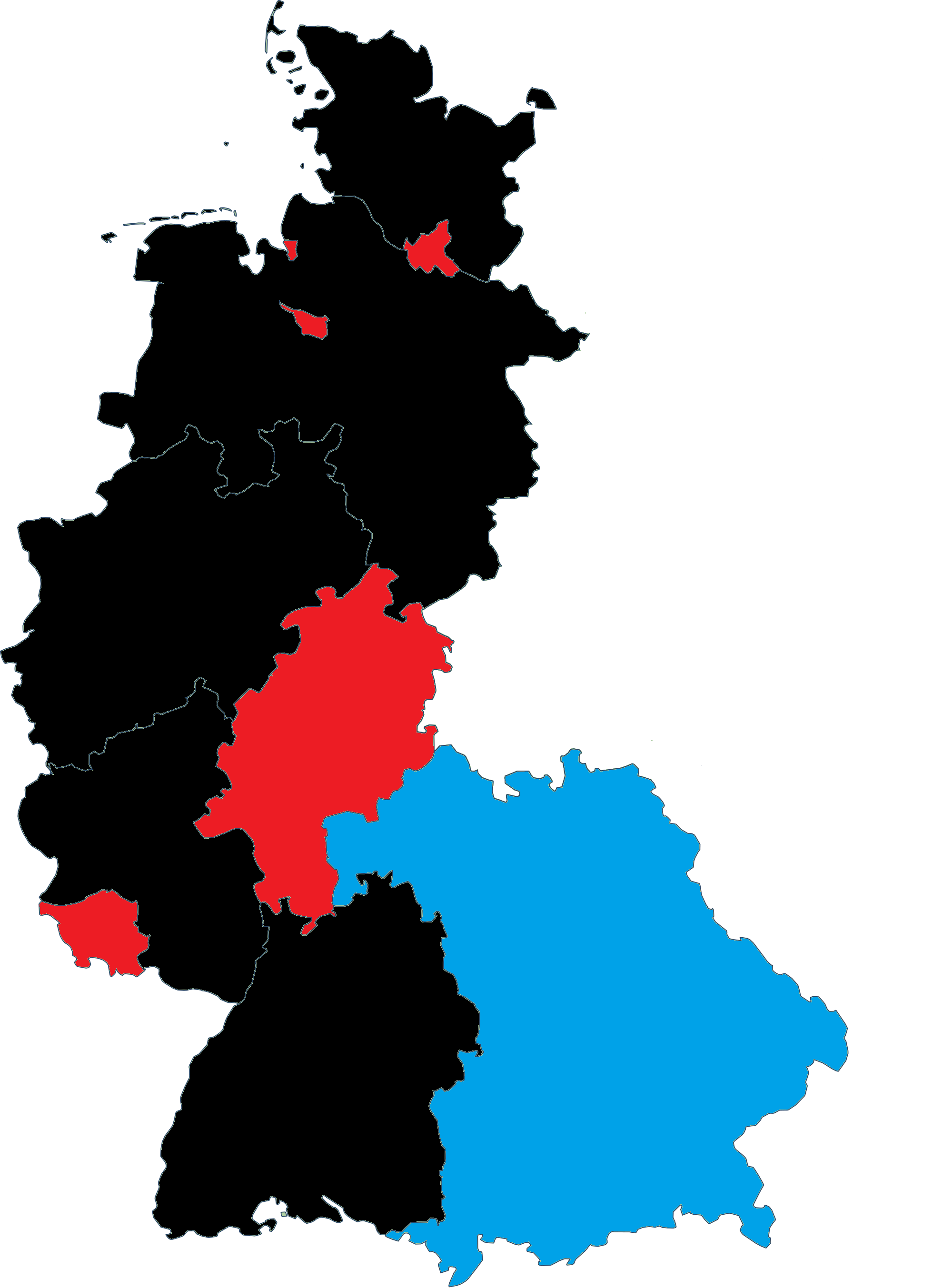 Elections européennes de 1984 en Allemagne, parti arrivé en tête par Land. Rouge : SPD Noir : CDU Bleu : CSU